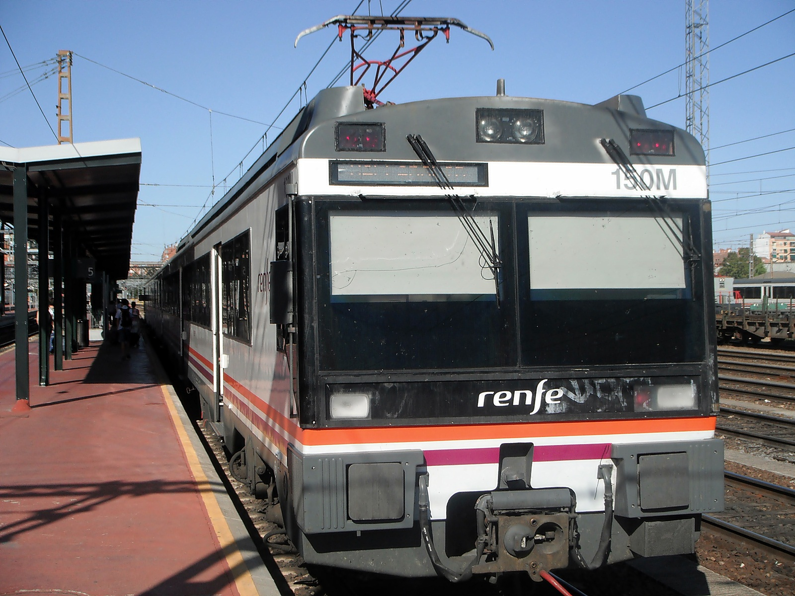 Tren 440-150 de Renfe, recien llegado a la estación de Valladolid, vía 5, procedente de Ávila